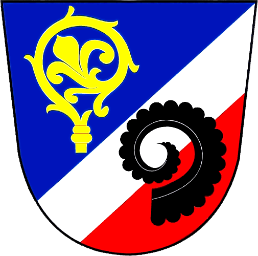 Znak obce Sluhy.